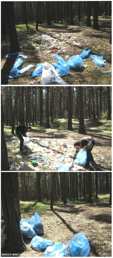 Экологический рейд на озере Ильменском